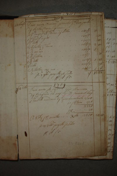 Seite aus dem ersten Journal der Buchhaltung von Farina 1709